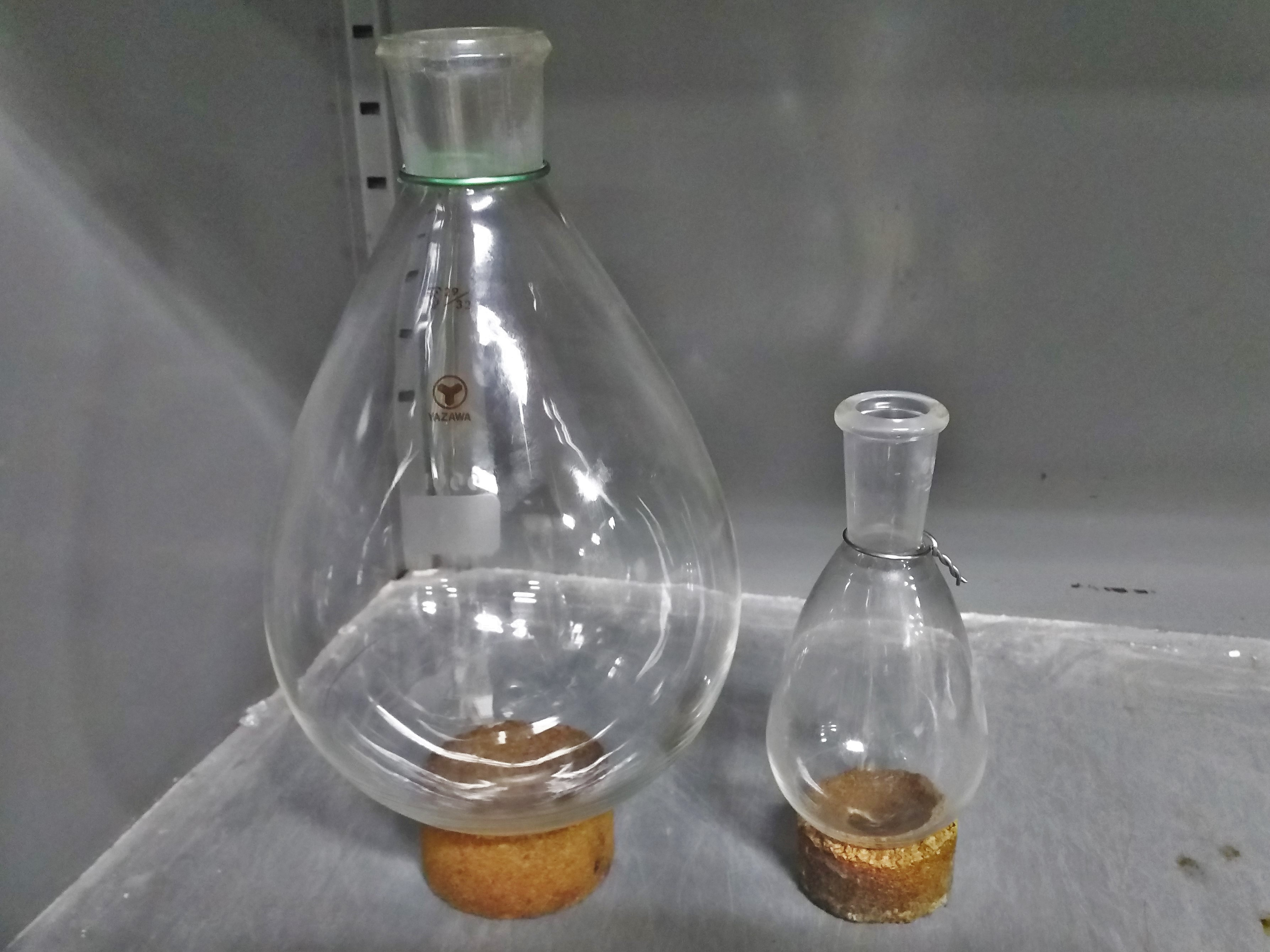 2種のナス型フラスコ